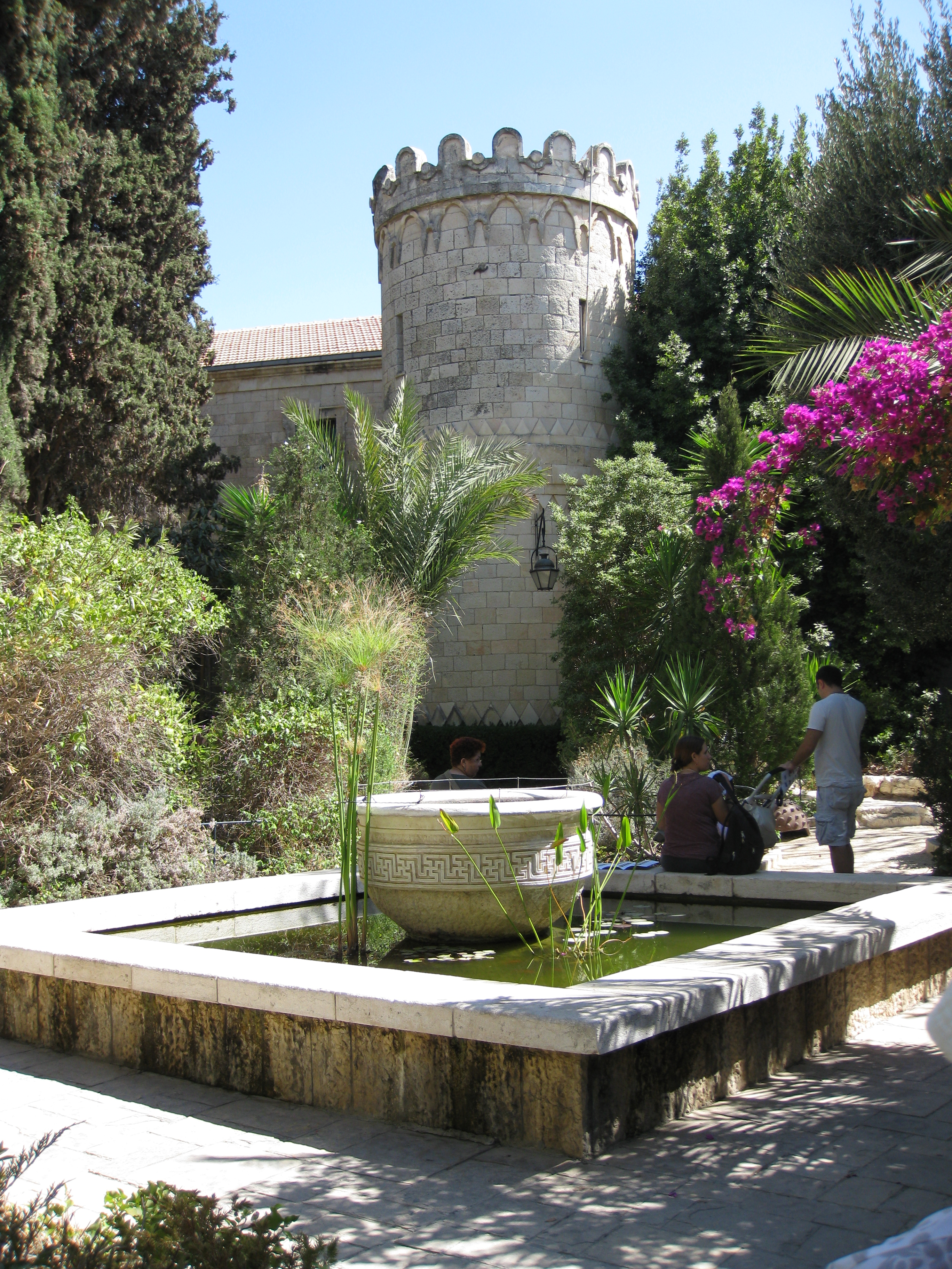 Sergei's Court חצר סרגי